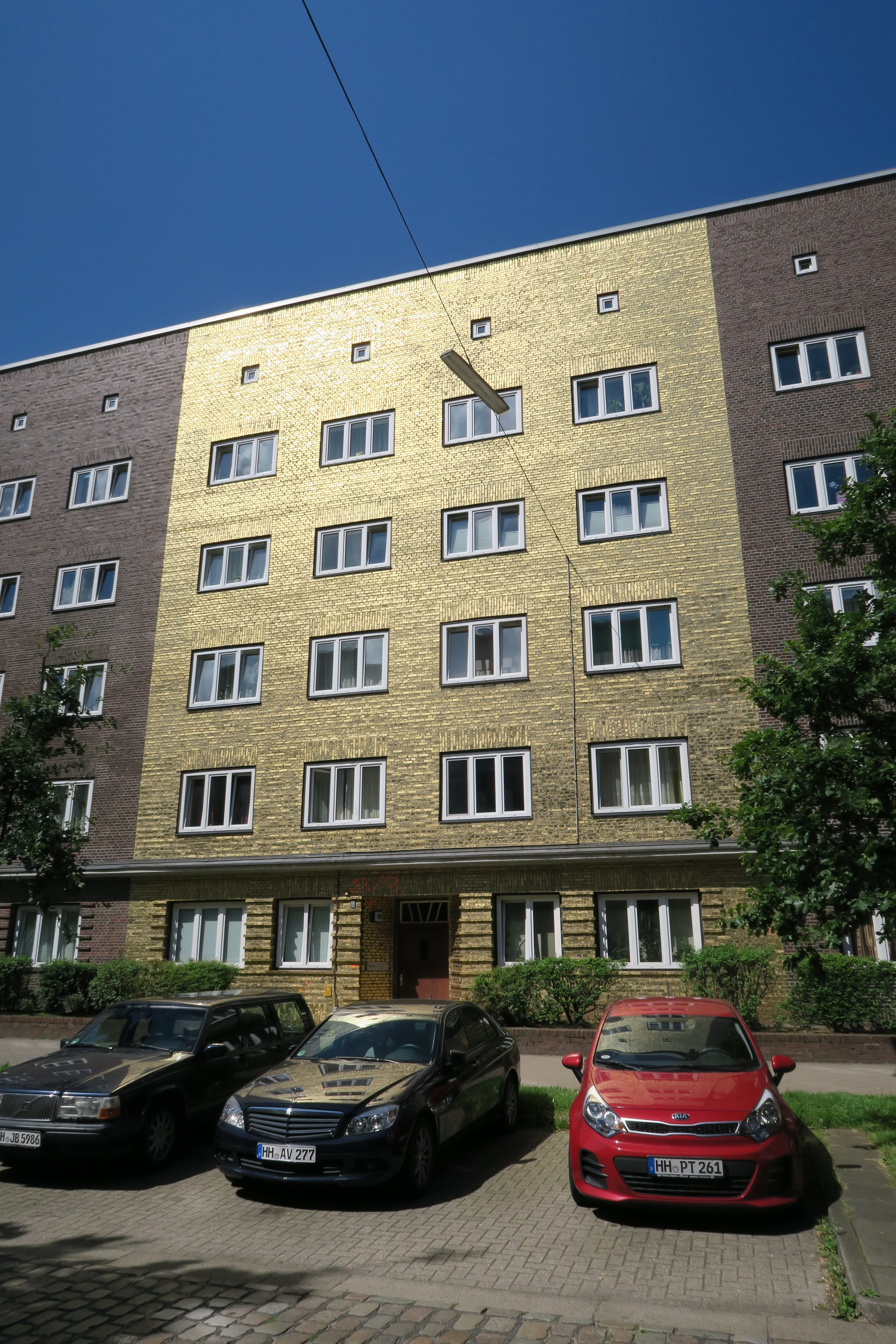 Goldhaus Veddeler Brückenstraße 152, Hamburg-Veddel